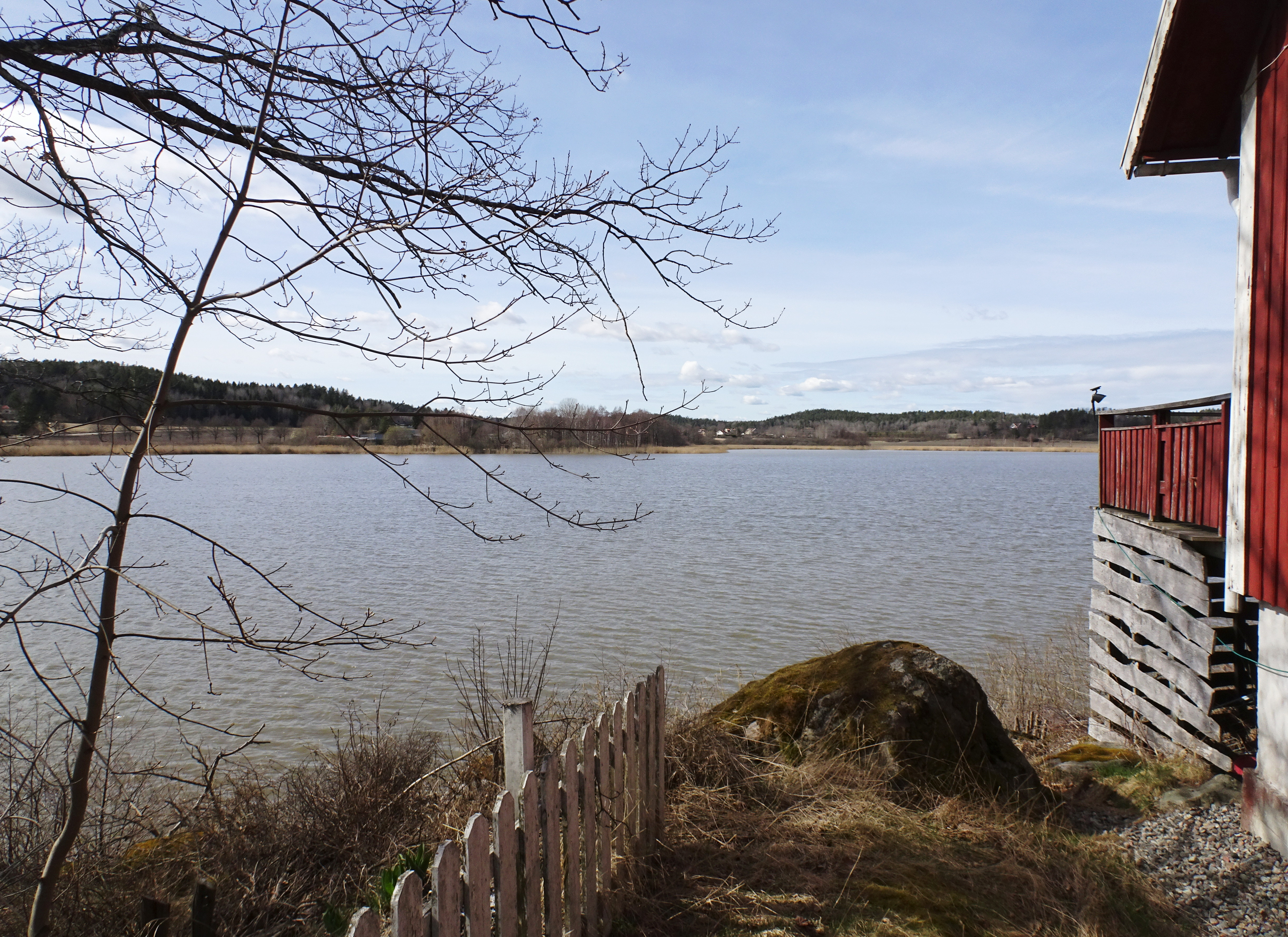 Lillsjön i Hölö socken, Södermanland, vy mot norr från Väsby torp